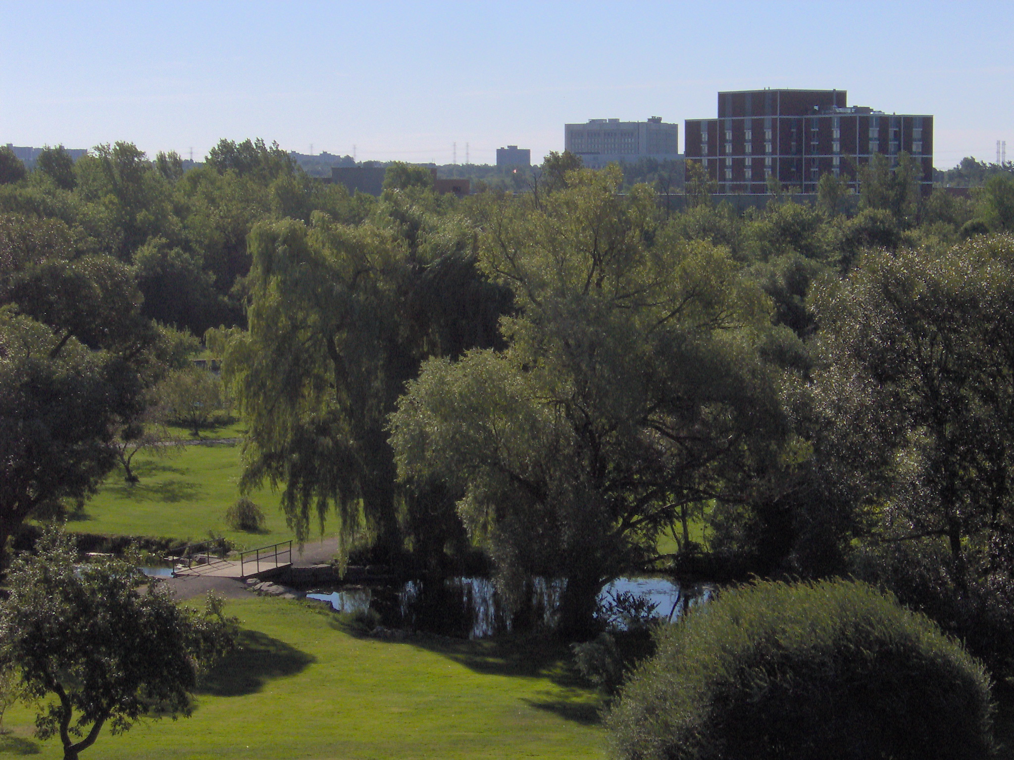 Sharon Saunders